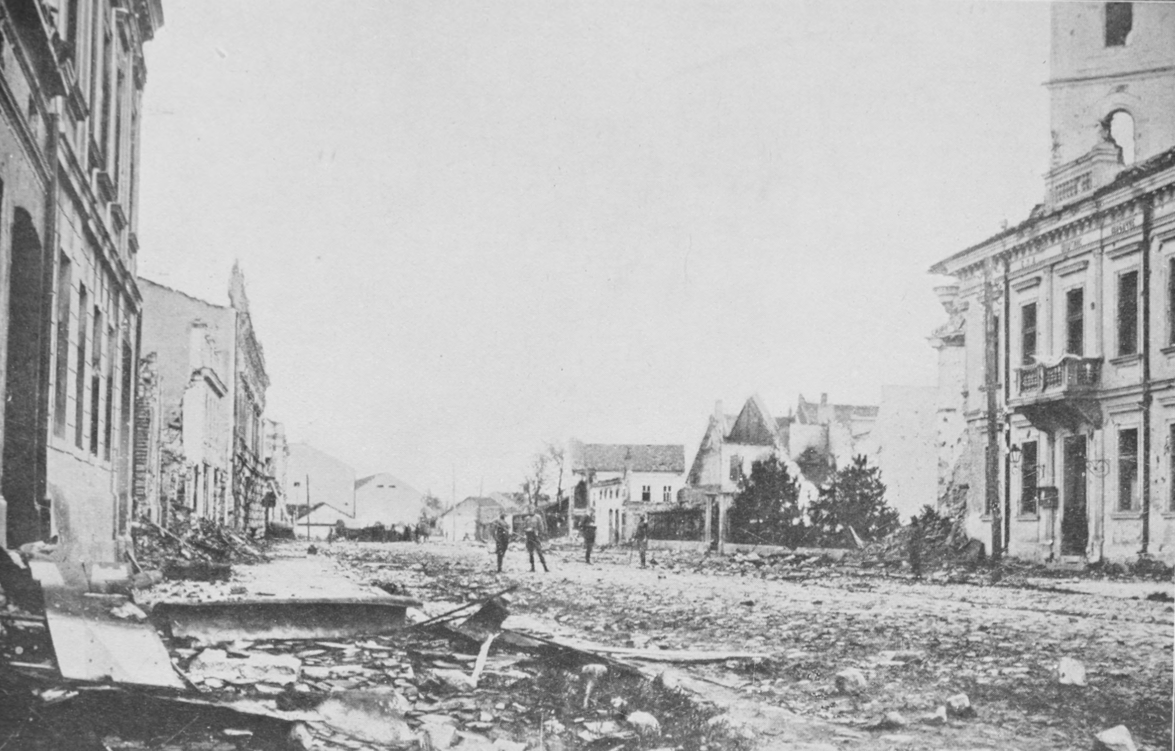 Šabac (Shabatz) bombardeada en octubre de 1914.